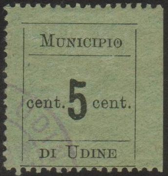 Почтовая марка города Удине (Италия)